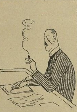 Карикатура на В. Д. Набокова. "Набокова засадили писать порнографические романы".